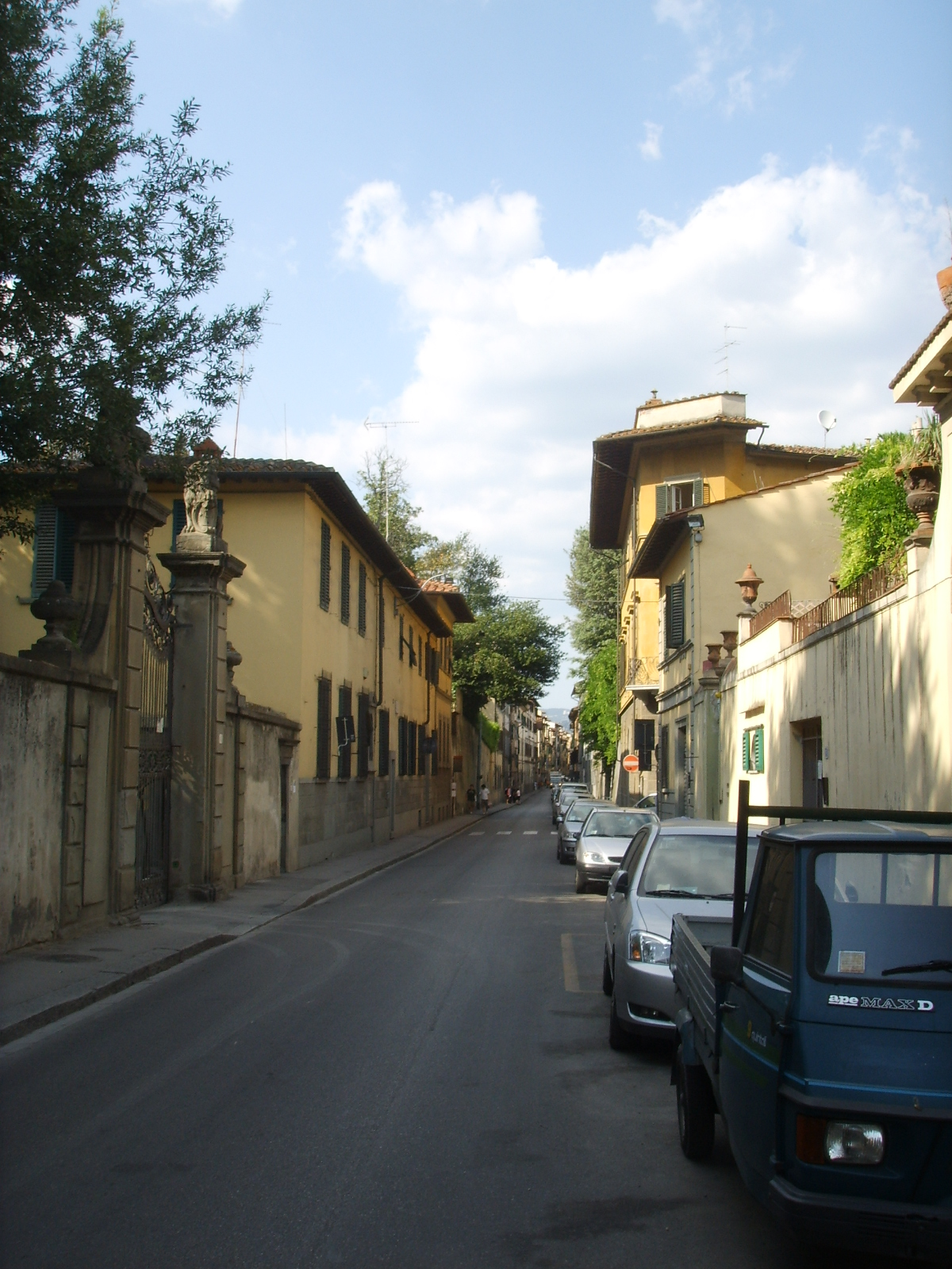 Via de' serragli, presso giardino torrigiani